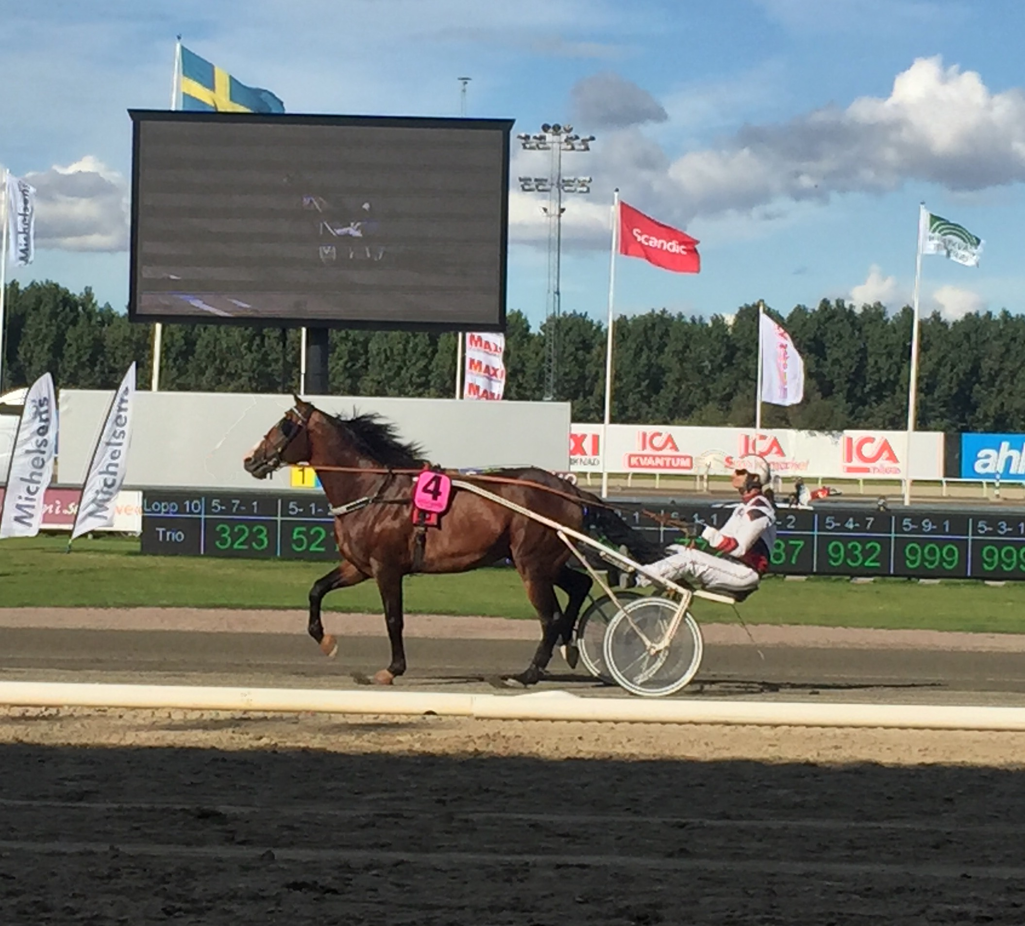 Fredrik Persson och hästen Monark Newmen inför finalen av Svenskt Travderby 2017.